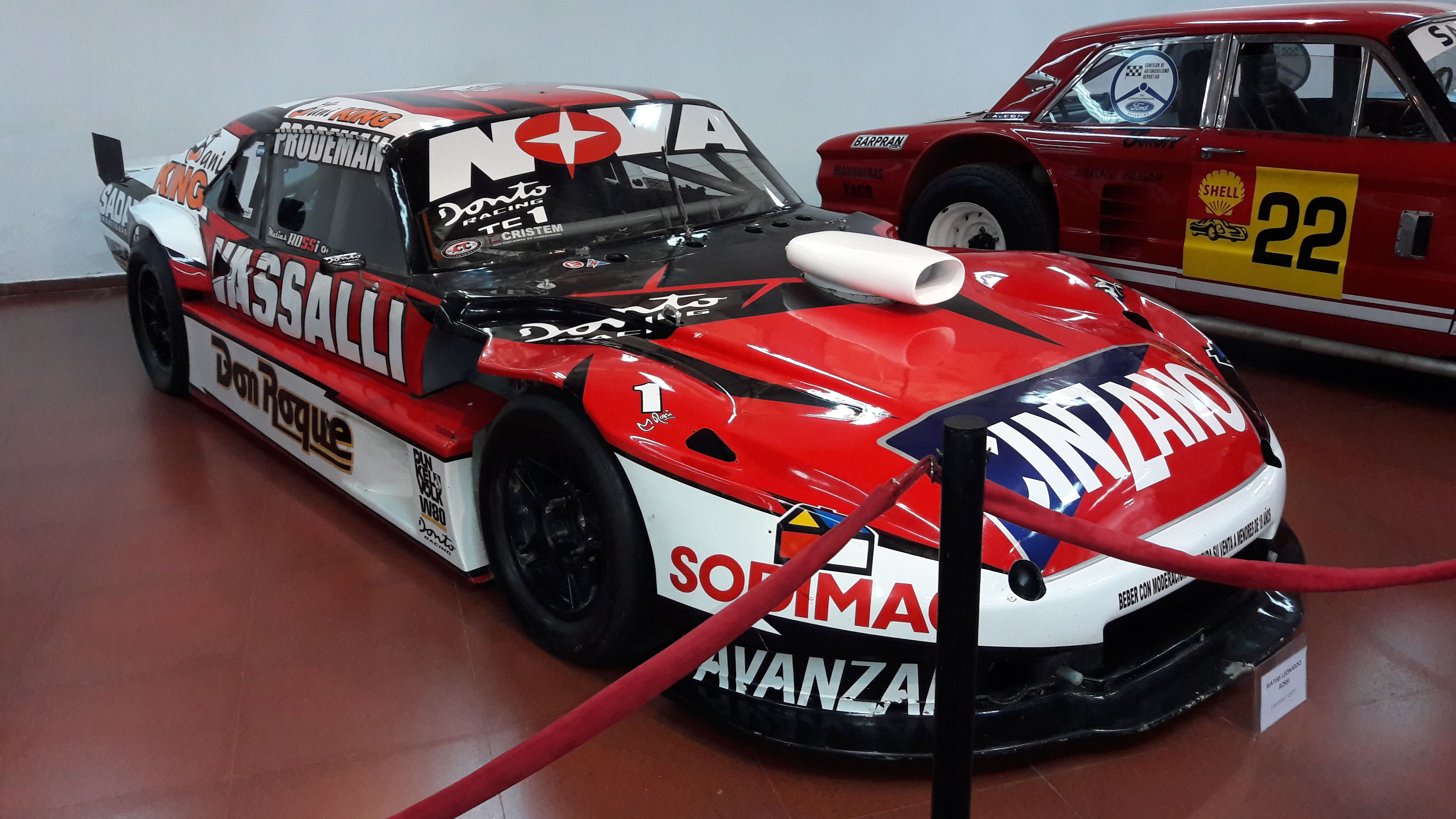 Chevrolet Chevy - Matías Rossi. Expo Autos, Museo de Bellas Artes de Luján.